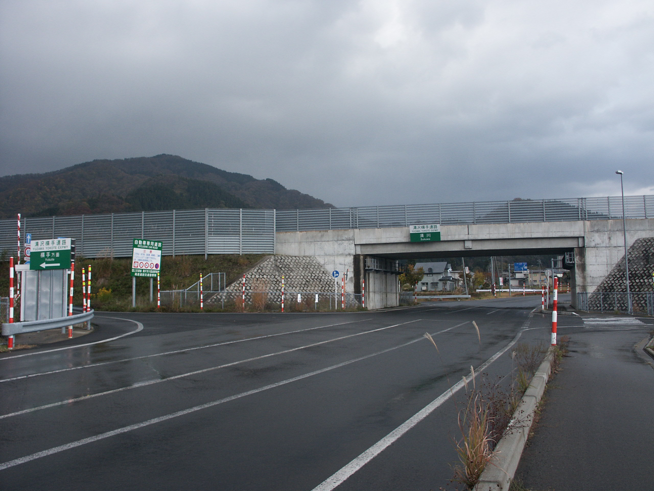 湯沢横手道路須川インター湯沢方面出入口付近